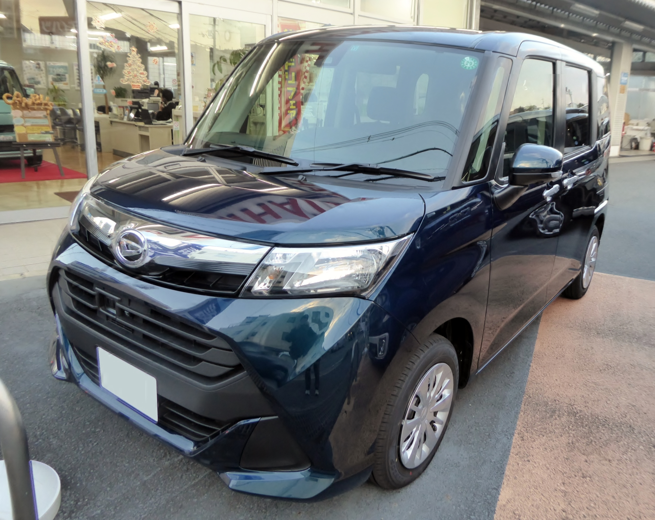 DBA-M900S型ダイハツ・トールG"SA II"をフロントから撮影。